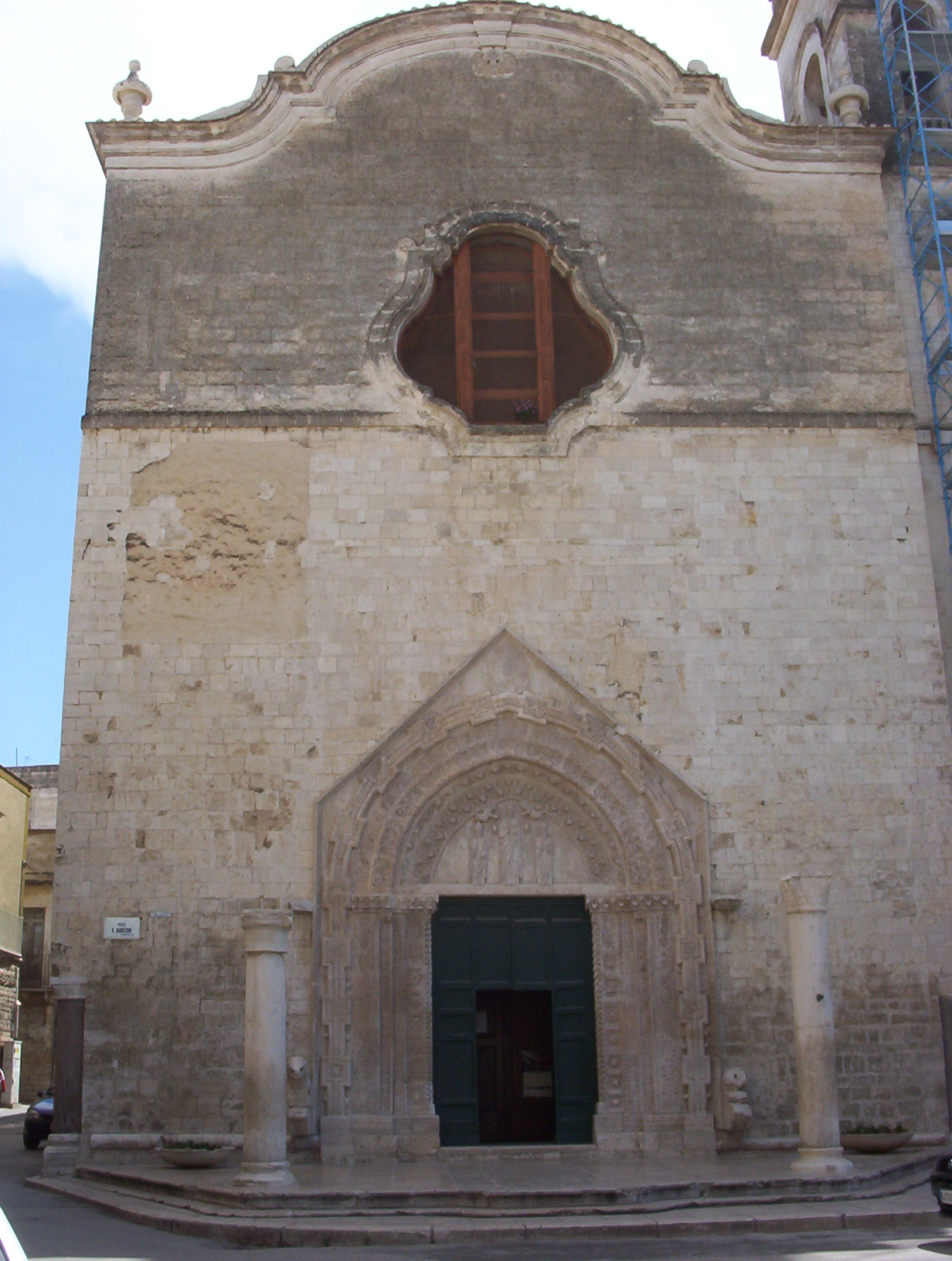 Foto realizzata da me. Ne autorizzo la pubblicazione su wikipedia.